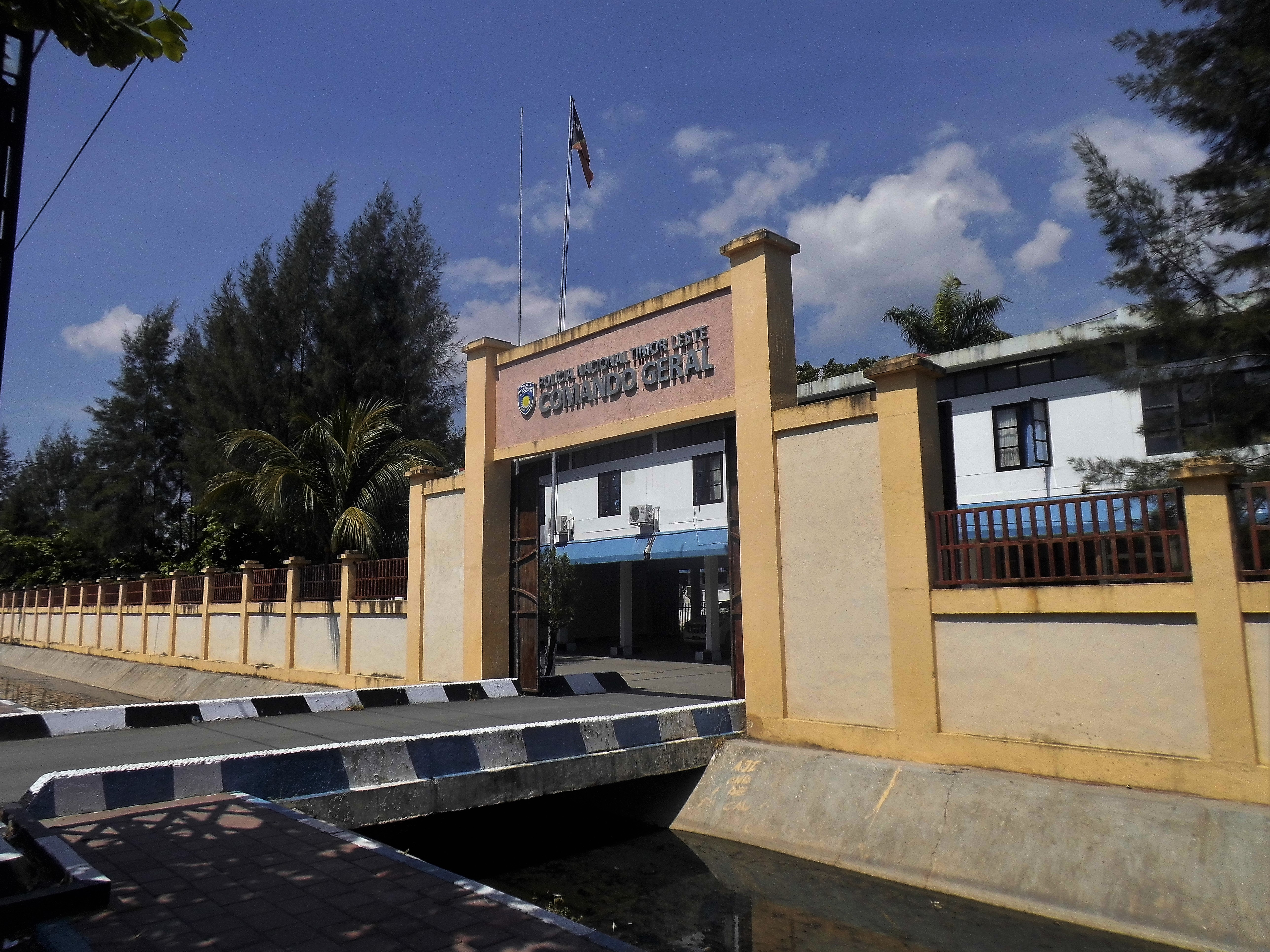 Hauptquartier der Polizei